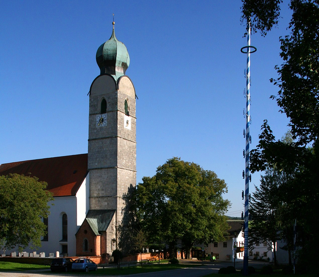 Die katholische Pfarrkirche St. Andreas in Grünthal (Gemeinde Unterreit, Landkreis Mühldorf am Inn, Oberbayern). Der sechsgeschossige spätgotische Turm wurde um 1450 aus Tuffstein und Nagelfluh erbaut. Die barocke Dachzwiebel stammt von 1720. Das einschiffige Langhaus wurde im neubarocken Stil 1897-99 ausgeführt, den spätgotischen Vorgänger ersetzend. Der farbenprächtige Innenraum zeigt noch originale barocke Einrichtung, zu welcher der Hochaltar, die beiden Seitenaltäre und die Kanzel zählen.